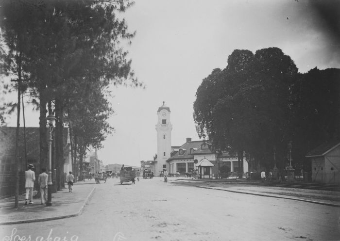 foto. Straatgezicht met het kantoor van Lindeteves-Stokvis in Soerabaja